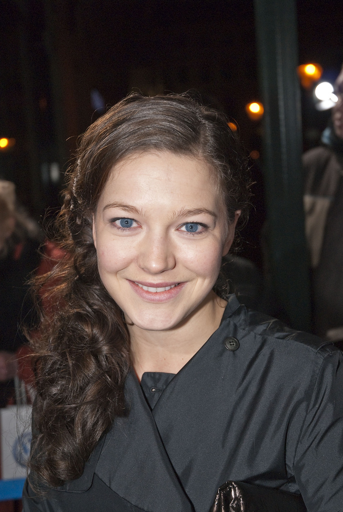 Hannah Herzsprung, German actress Volkswagen People’s Night 2008